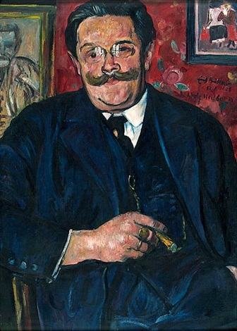 Erich Büttner: Portrait Dr. Adolf Heilborn, 1928. Oil on canvas, 82.5 x 59 cm. (32.5 x 23.2 in